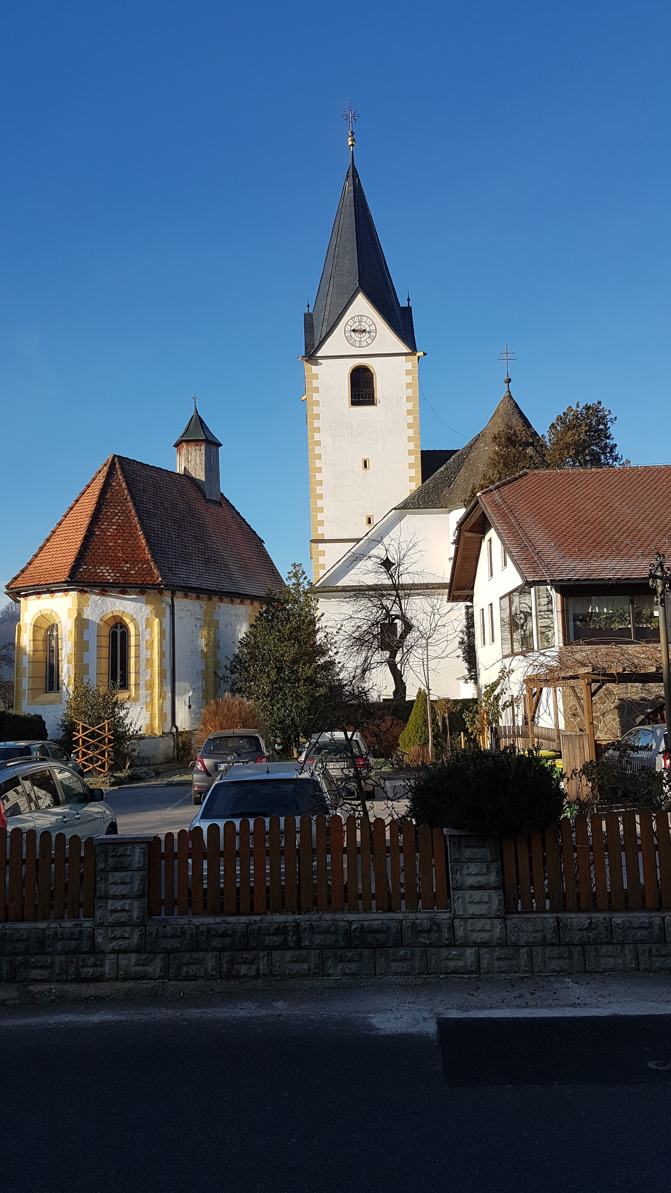 Župnijska cerkev sv. Lenarta, Nova Cerkev